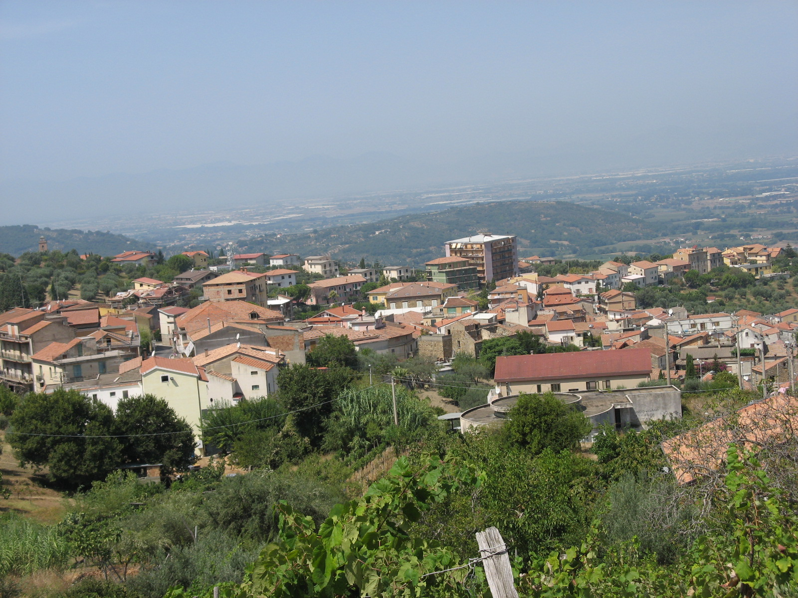 Panorama di Albanella, comune italiano in provincia di Salerno (Campania)